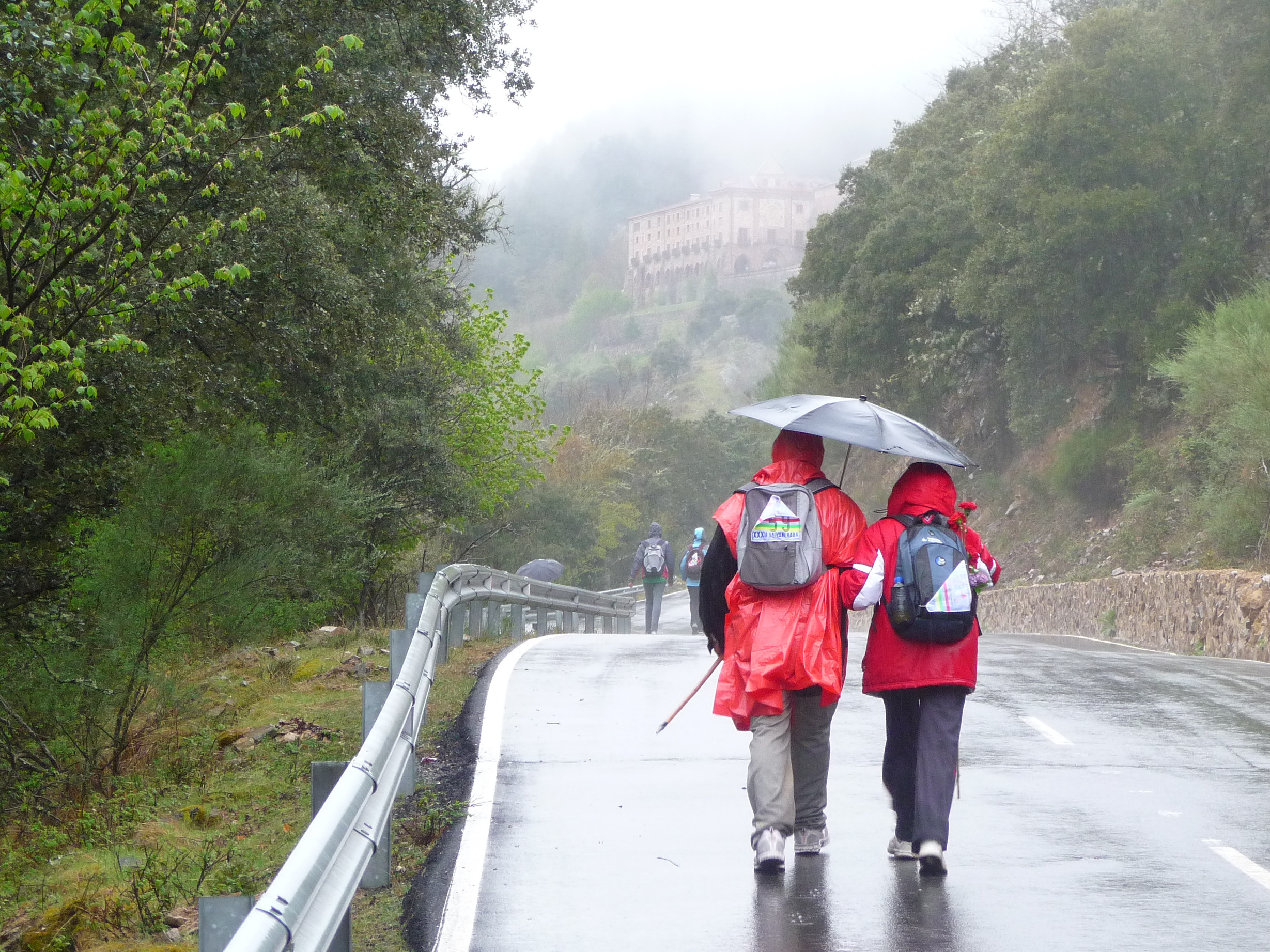 Caminantes llegando al Monasterio de Valvanera durante la Valvanerada.